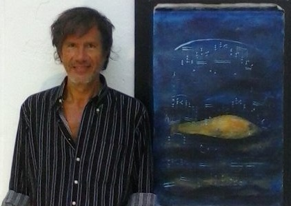 Коррадо Венециано на фоне своих работ